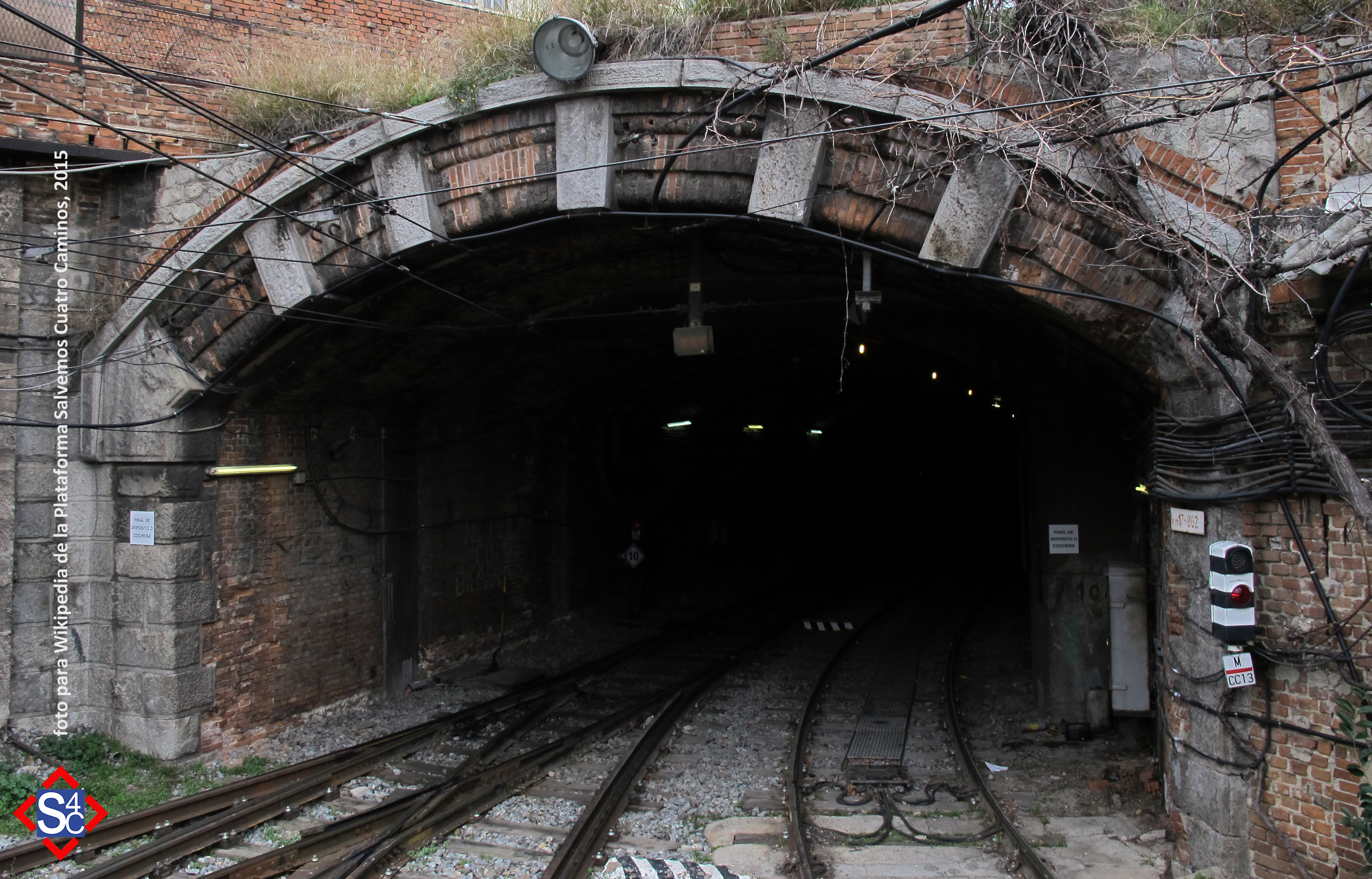 Se trata de la embocadura del túnel que conecta la línea 1 de Metro de Madrid con las Cocheras Históricas de Cuatro Caminos. Su diseño es de Antonio Palacios.